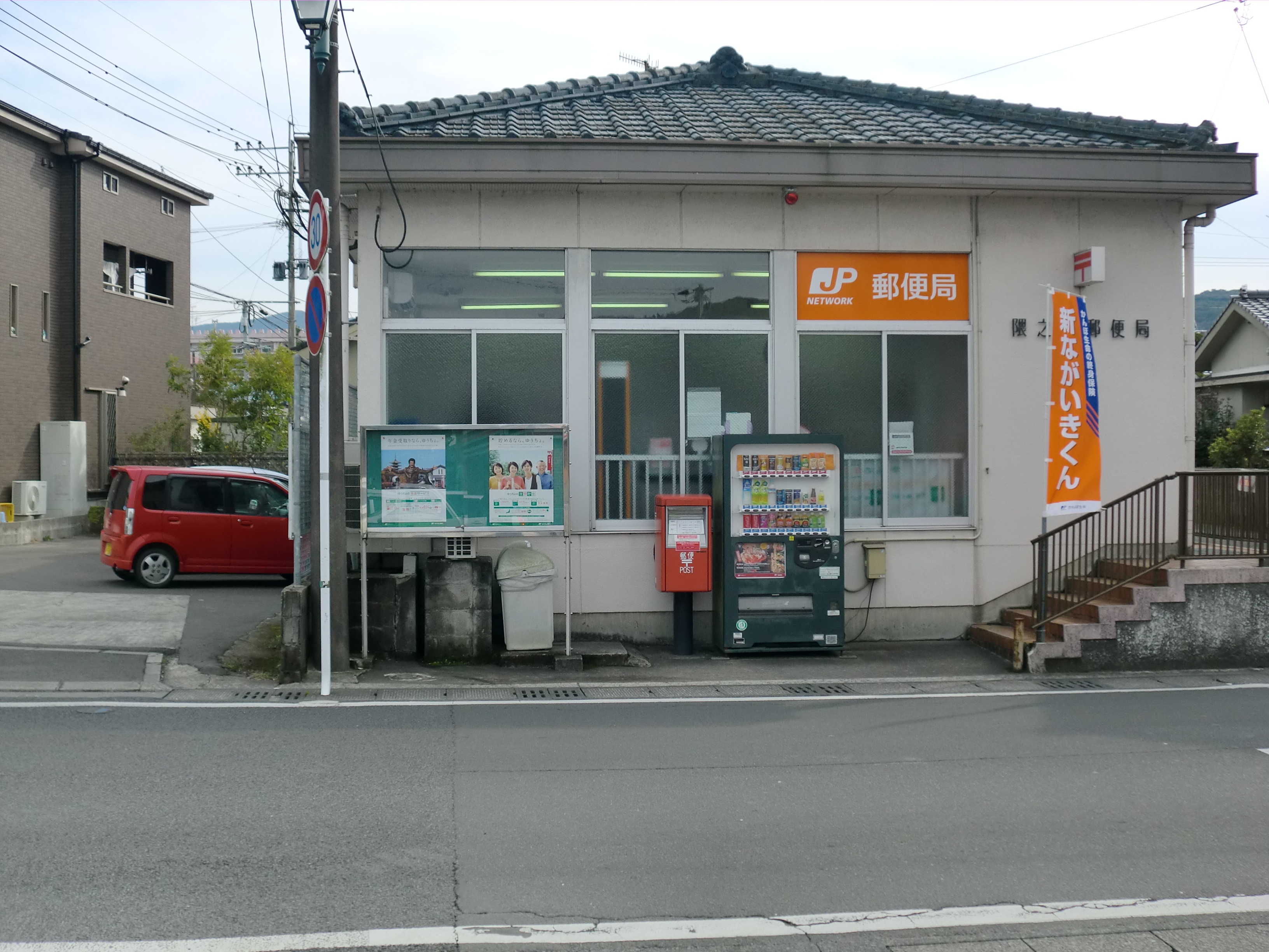 薩摩川内市にある隈之城（くまのじょう）郵便局